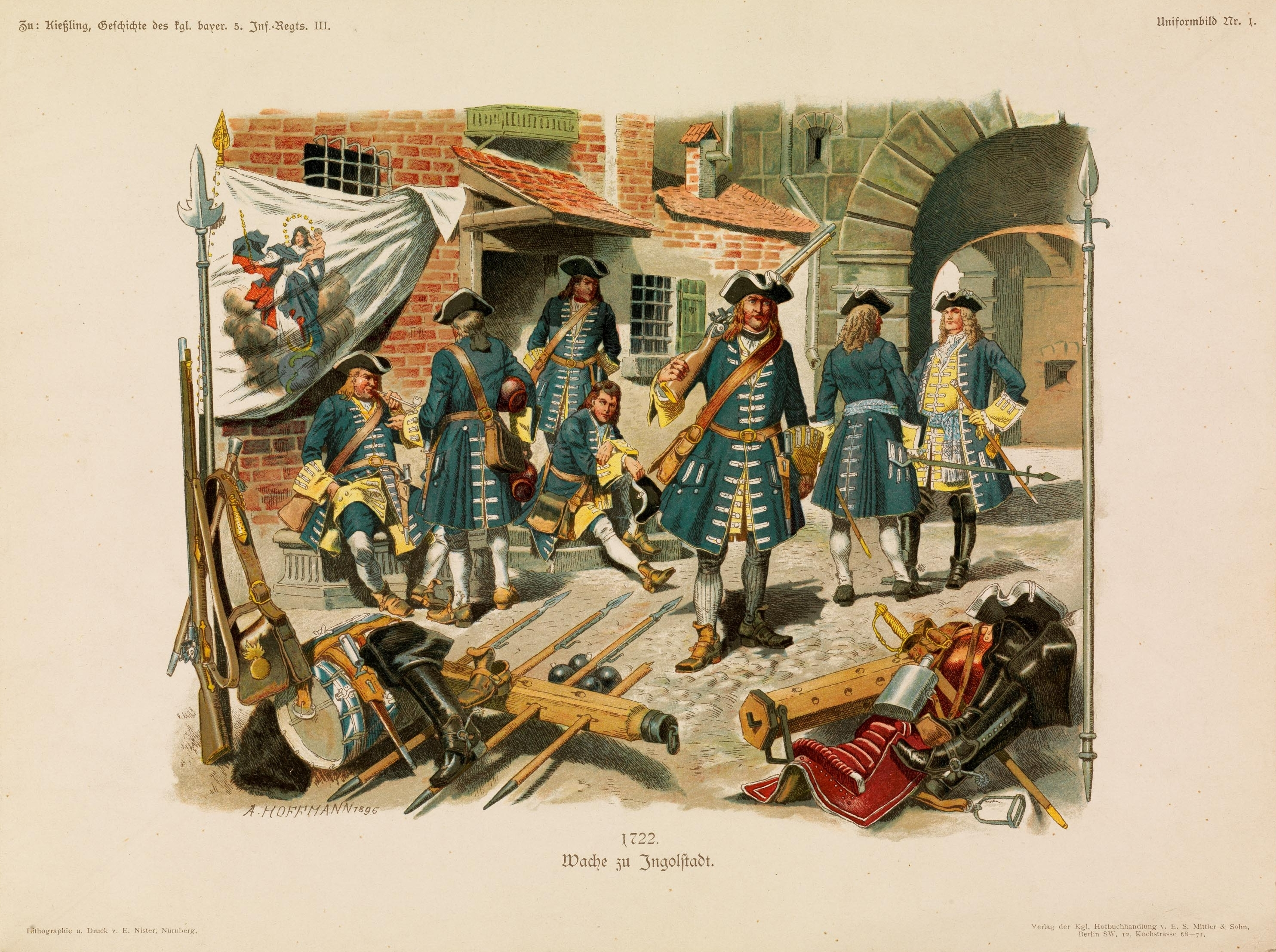 Uniform-Bilder zur Geschichte des Königl. Bayer. 5. Infanterie-Regiements Grossherzog Ernst Ludwig von Hessen. Lithographie und Druck v. E. Nister, Nürnberg. Verlag der Kgl. Hofbuchhandlung v. E. S. Mittler & Sohn, Berlin.